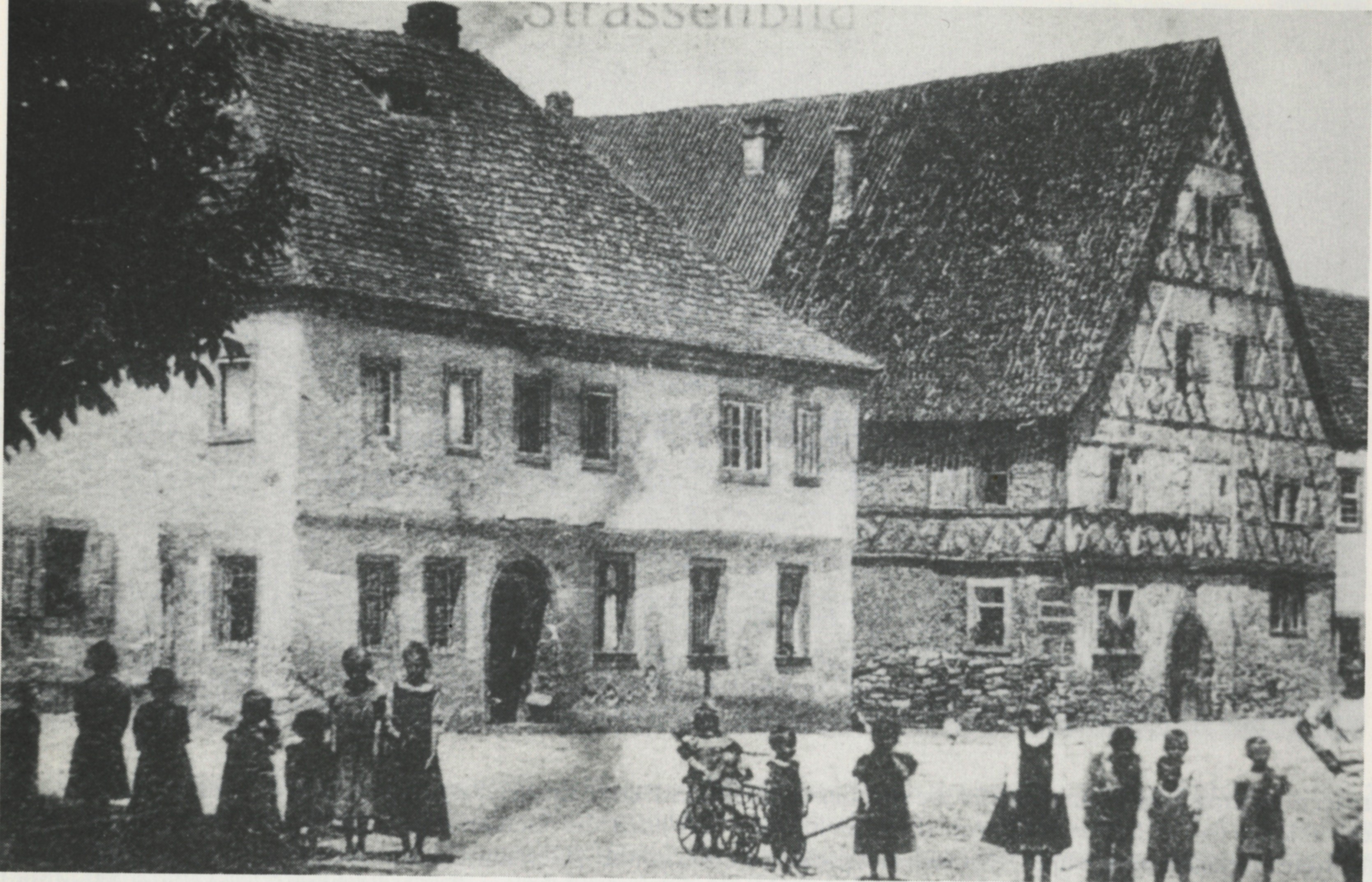 Fotografie um 1900: Marktplatz Stadtschwarzach mit Engelwirtshaus und ehemaliger Zehntscheune des Klosters Münsterschwarzach (1516 erbaut, 1953 durch Umgestaltung stark verändert)